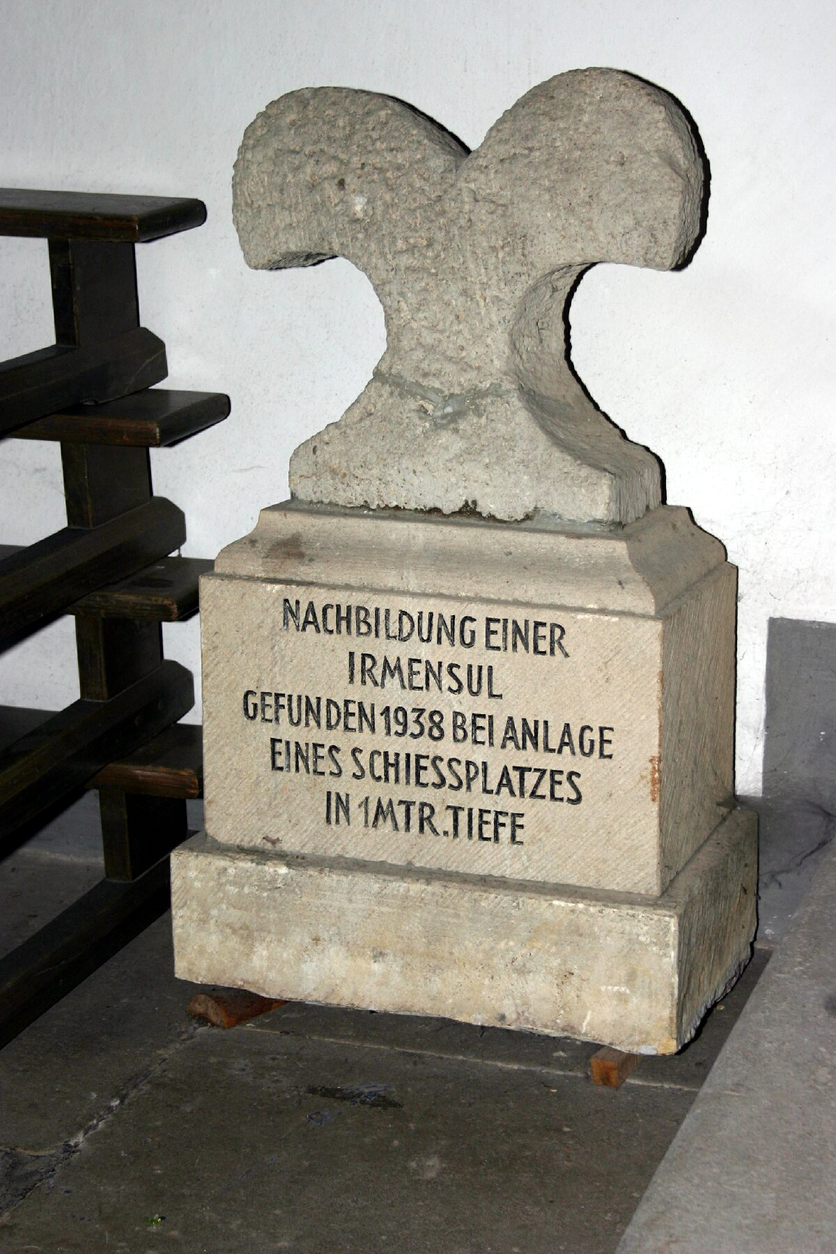 Nachbildung der Irminsul in der Kirche Petrus und Paulus Obermarsberg